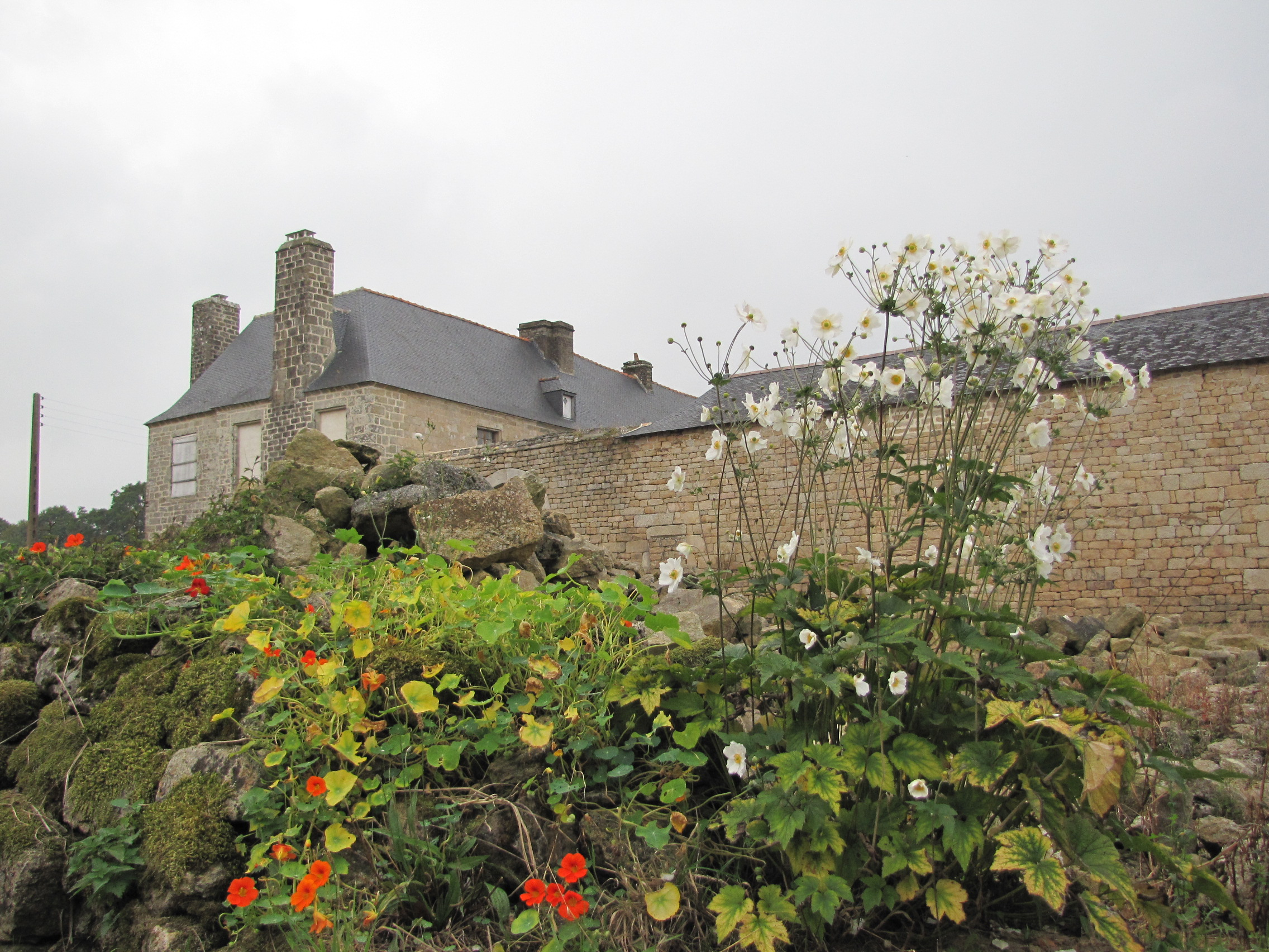 Le château de Saint Quijeau à Lanvénégen en septembre 2009.